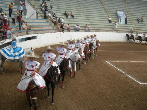 Charrería